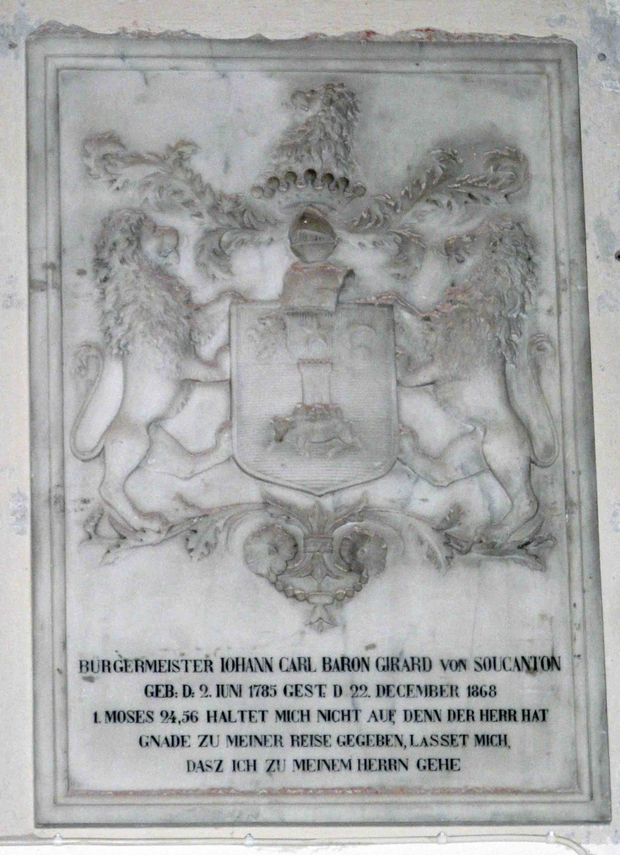 Epitaph für Johann Karl Baron Girard de Soucanton in der Olaikirche, Talinn (Reval)